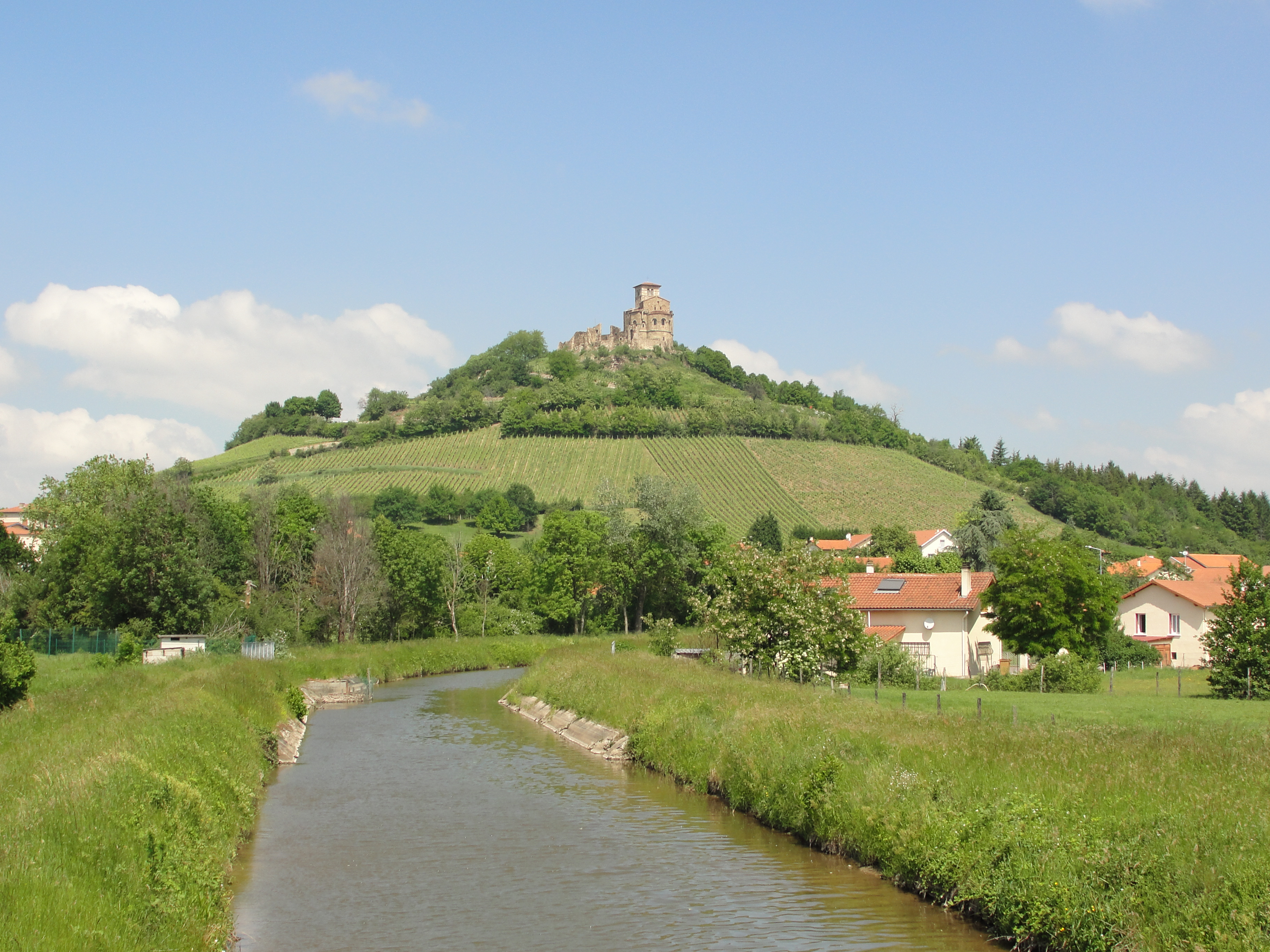 Le canal du Forez, qui s'étire sur une cinquantaine de km selon une orientation grossièrement S-N, arrose Saint-Romain le Puy (Loire) en contournant le pic du prieuré par l'est.